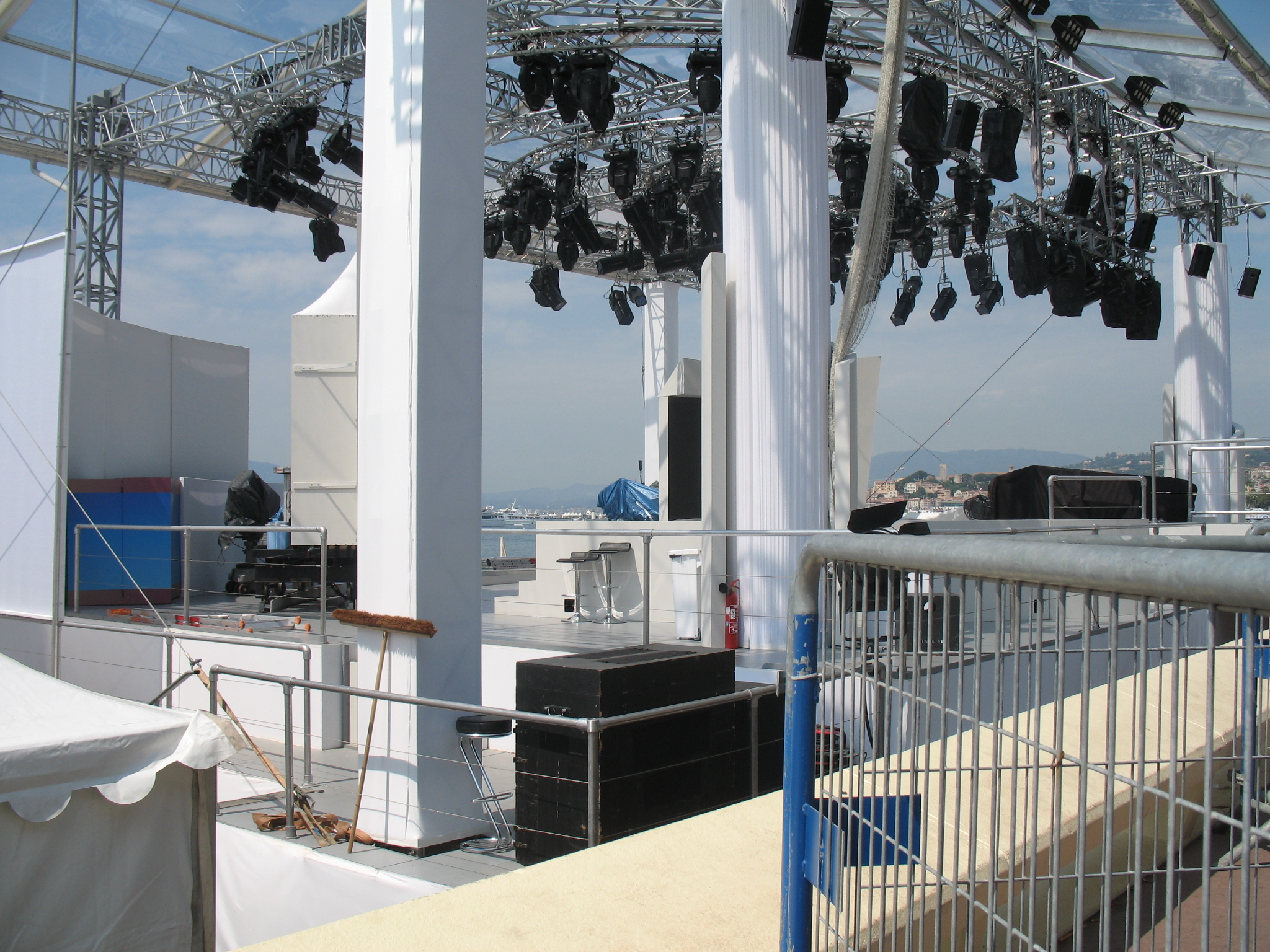 Plateau extérieur de l'émission Le Grand Journal à Cannes, lors du Festival du film en 2007.